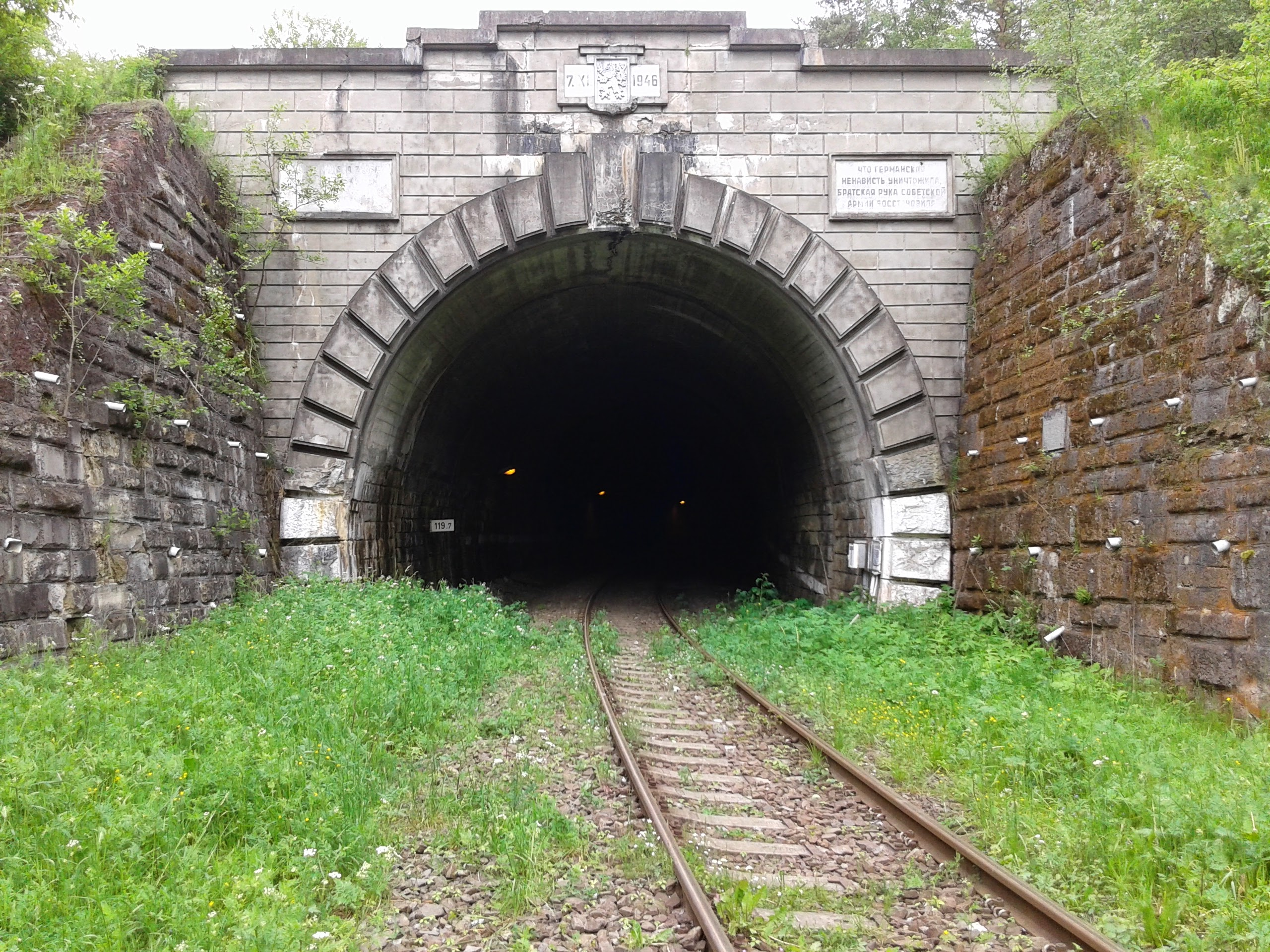 Wlot od strony Słowacji